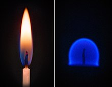 Efectes de la microgravitat